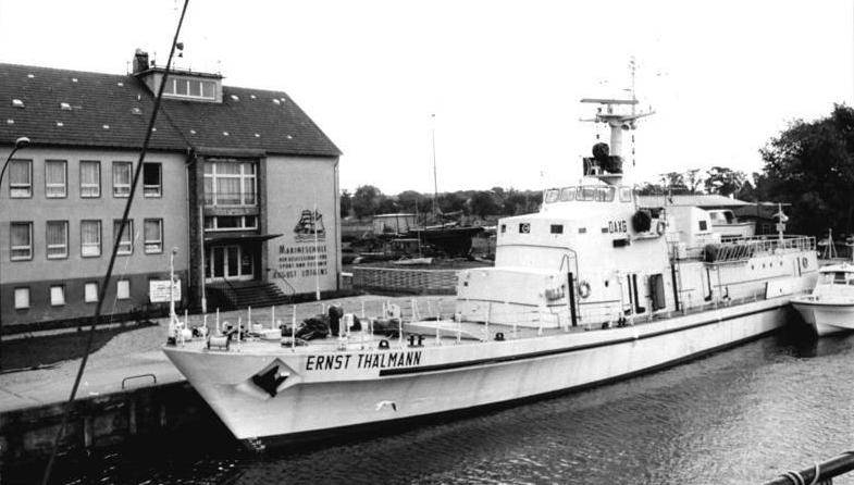 Greifswald, GST-Marineschule "August Lütgens" ADN-ZB Sindermann 16.11.1977 Greifswald: Die GST-Marineschule "August Lütgens" in Greifswald-Wieck. Im Vordergrund ist das modernste Ausbildungsschiff, die "Ernst Thälmann", zu sehen.